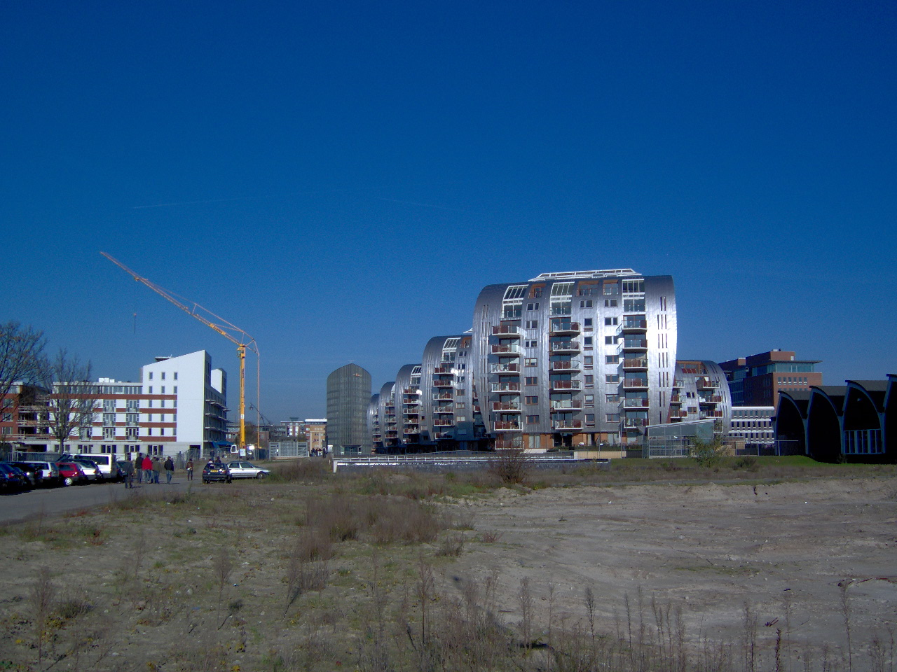 eigen foto categorie:afbeelding 's-Hertogenbosch